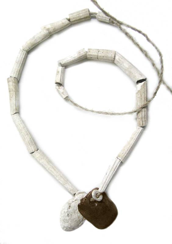 16 tubetti di dentalium fossile; 3 dischetti integri e vari frr. di madreperla; un pendaglio in quarzo di forma ovaleggiante con foro passante circolare in posizione eccentrica; un pendaglio quadrangolare in lamina ossea, levigato solo su una faccia con foro passante collocato in corrispondenza di uno dei lati.